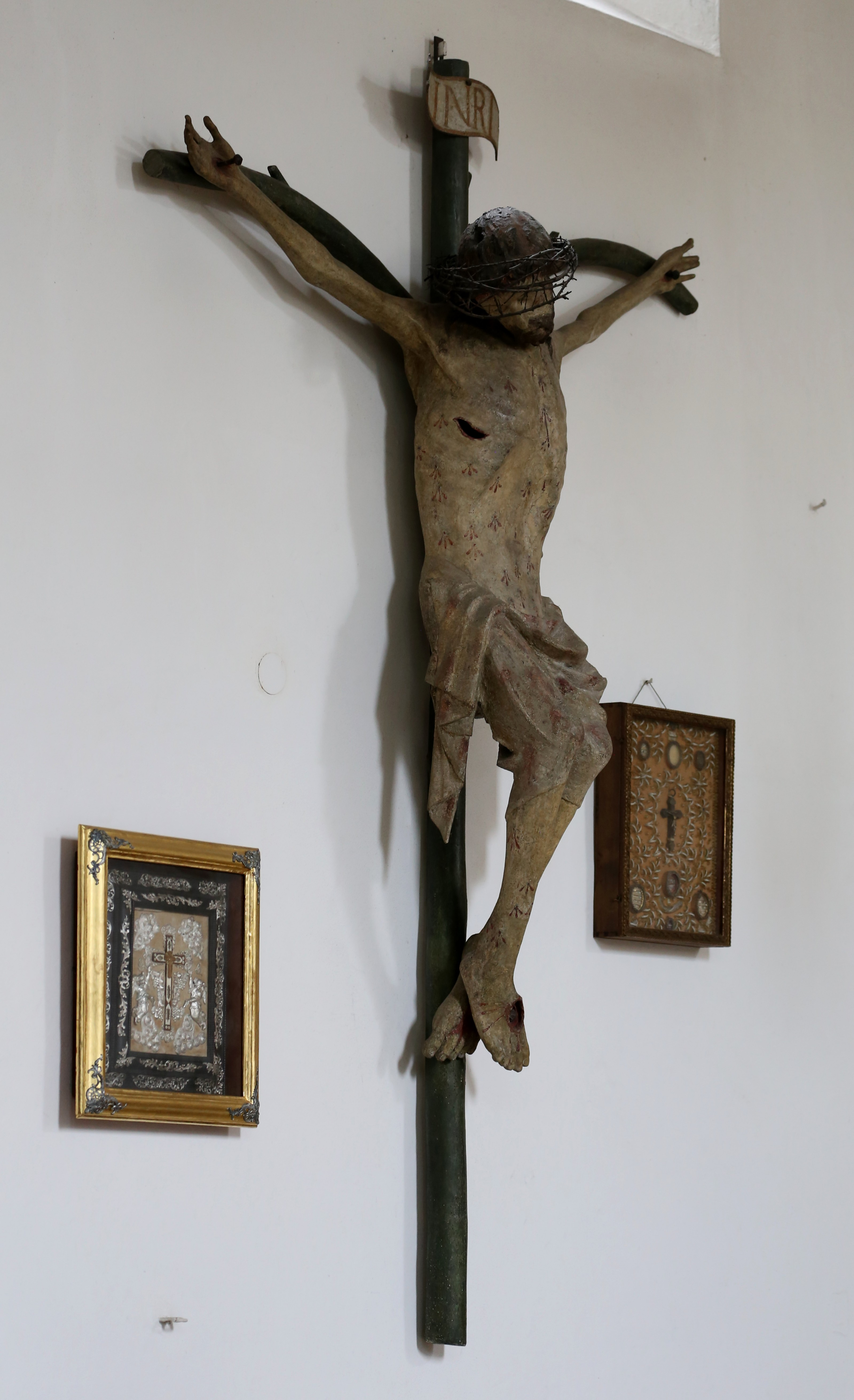 Altenhohenau 10; Dominikanerinnen-Klosterkirche St. Peter und Paul, Saalbau mit eingezogenem Chor und westlichem Dachreiter mit Zwiebelhaube, barocker Neubau um 1670/75 unter Einbeziehung älterer Teile seit 1235, Apsis, Chor und Langhaus- Außenmauern romanisch, Rokoko-Ausbau 1765/74, Turm 1773; mit Ausstattung.